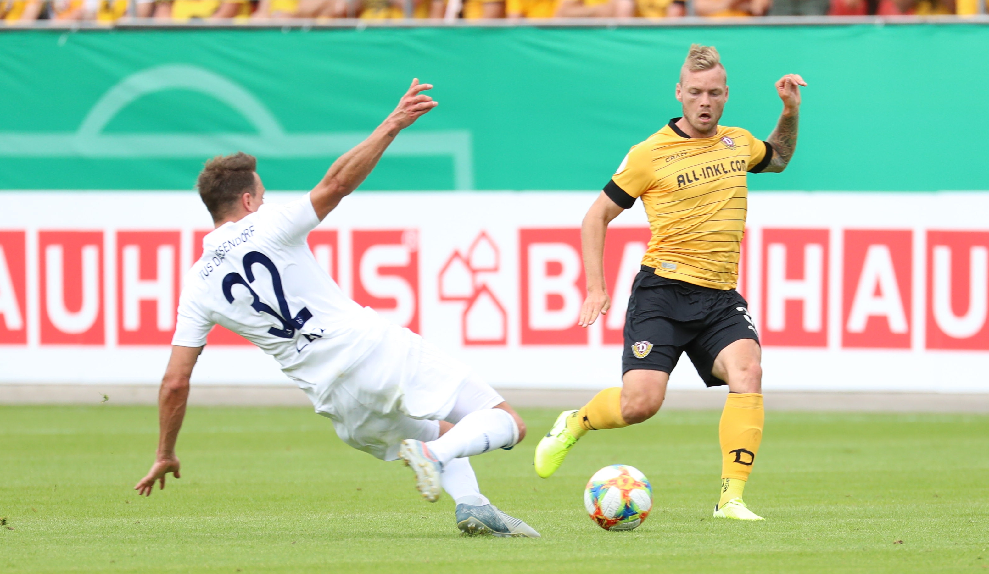 DFB-Pokal 2019/20, 1. Hauptrunde, TuS Dassendorf gegen SG Dynamo Dresden 0:3 (0:1)